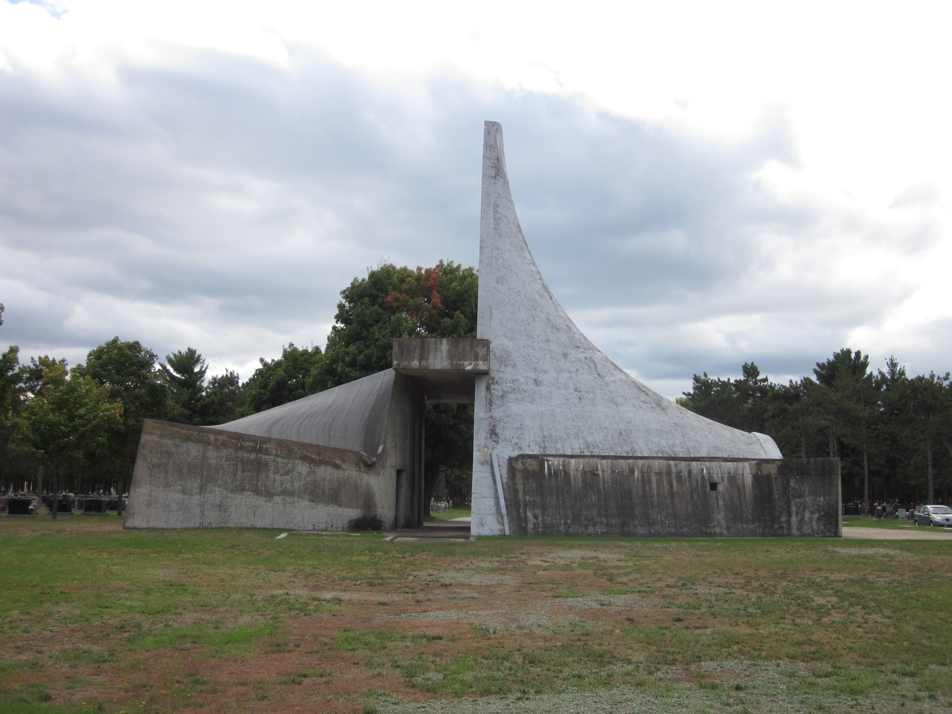 Mausolée des Évêques-de-Trois-Rivières, 3400, boulevard des Forges, Trois-Rivières (Canada). (Protection MH classé. Voir la liste des lieux patrimoniaux de la Mauricie pour plus de détails).